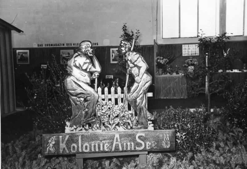 Erste Bundesgartenschau in Hannover Im Paradies des Kleingärtners.